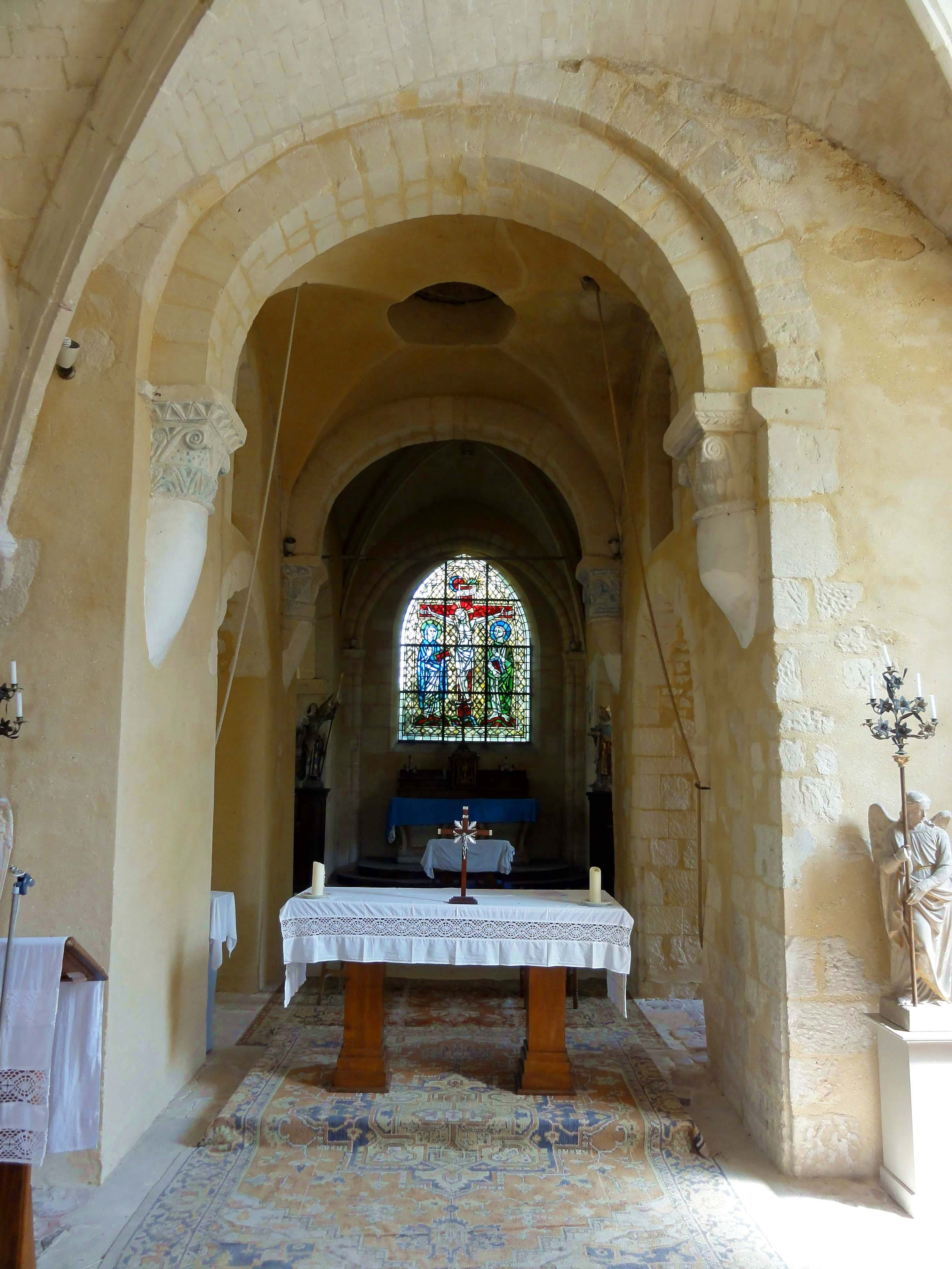 Intérieur de l'église (voir titre).